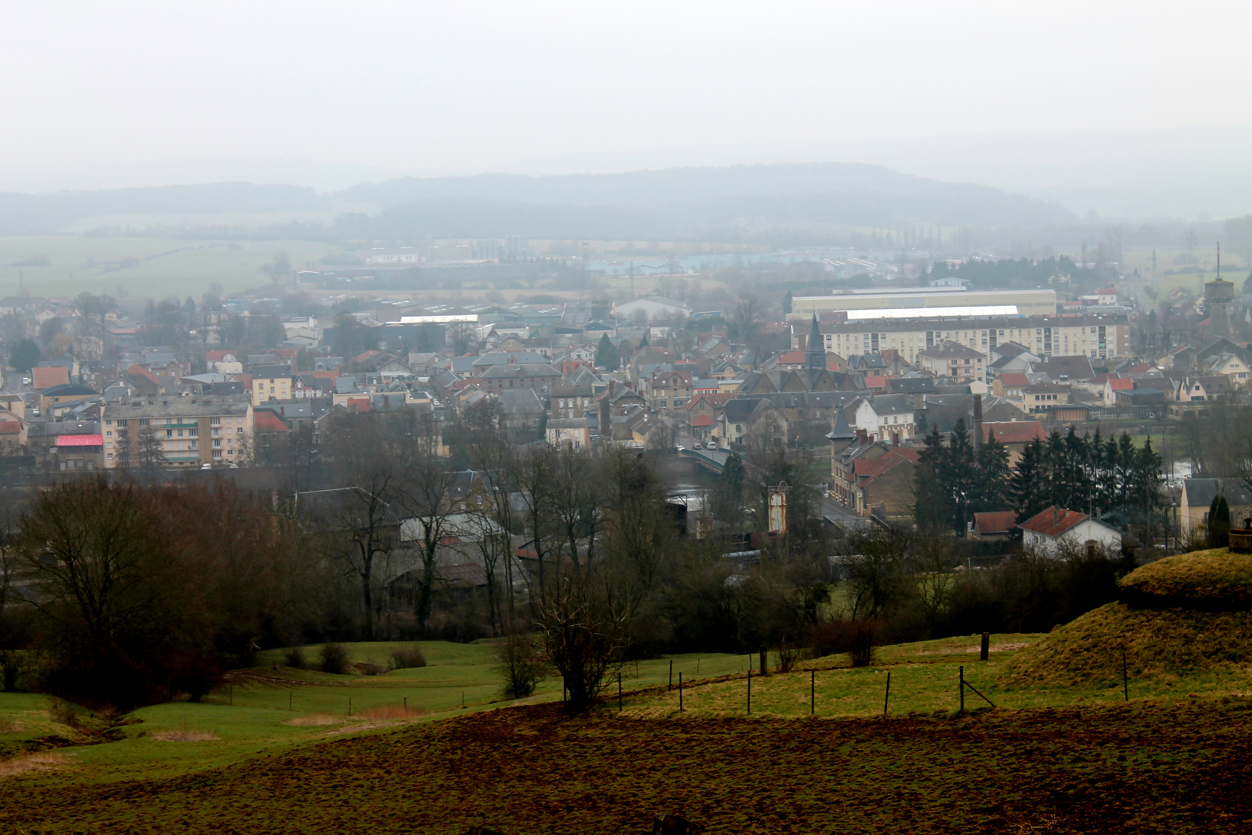 Vue de Donchery, de la route de la Croix-Piot.